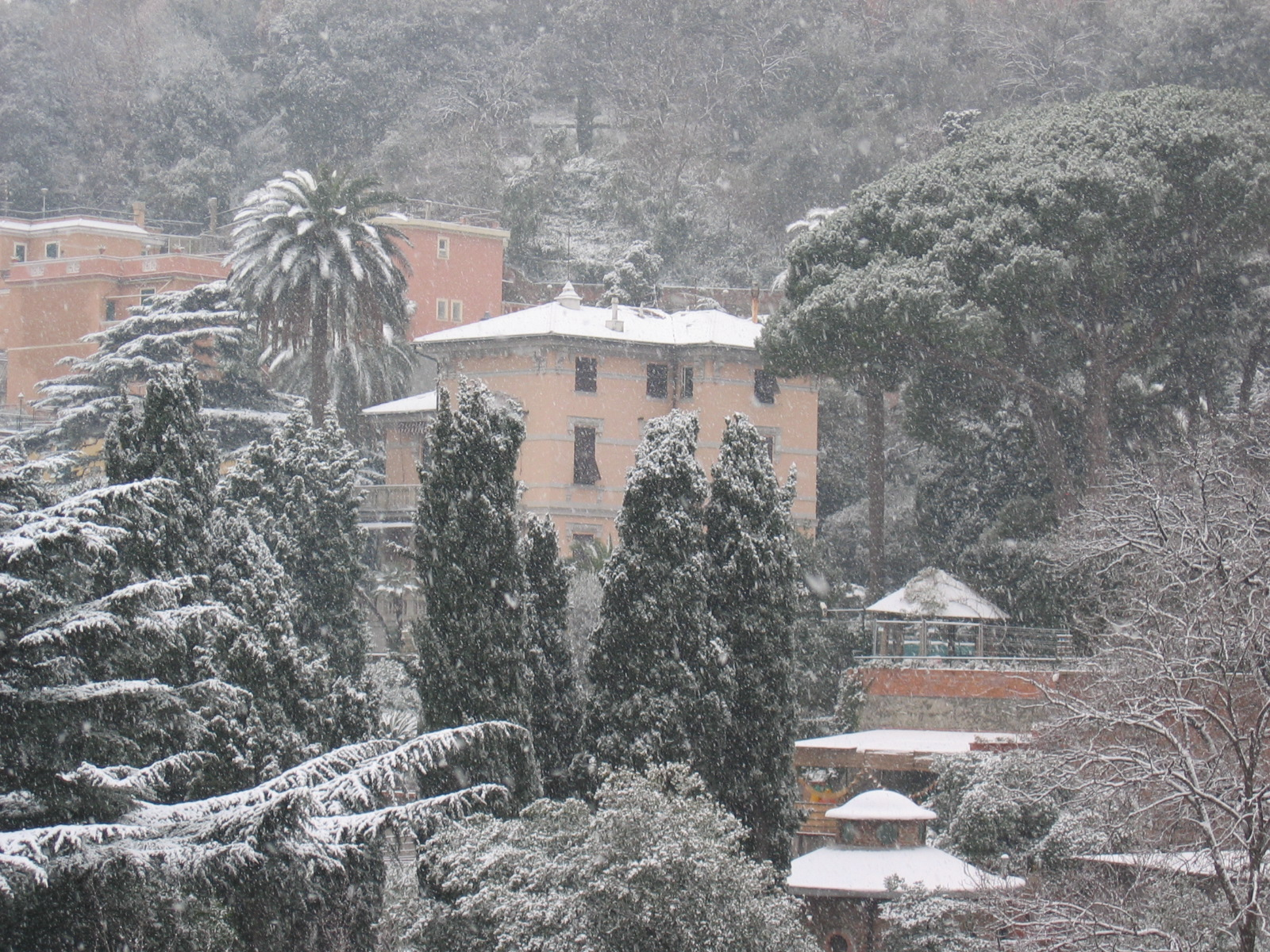 Situata all'incirca a metà altezza di Viale Modugno è stata la residenza di molti industriali.